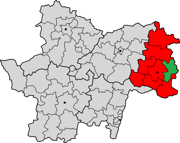 Kantono de Beaurepaire en Bresse